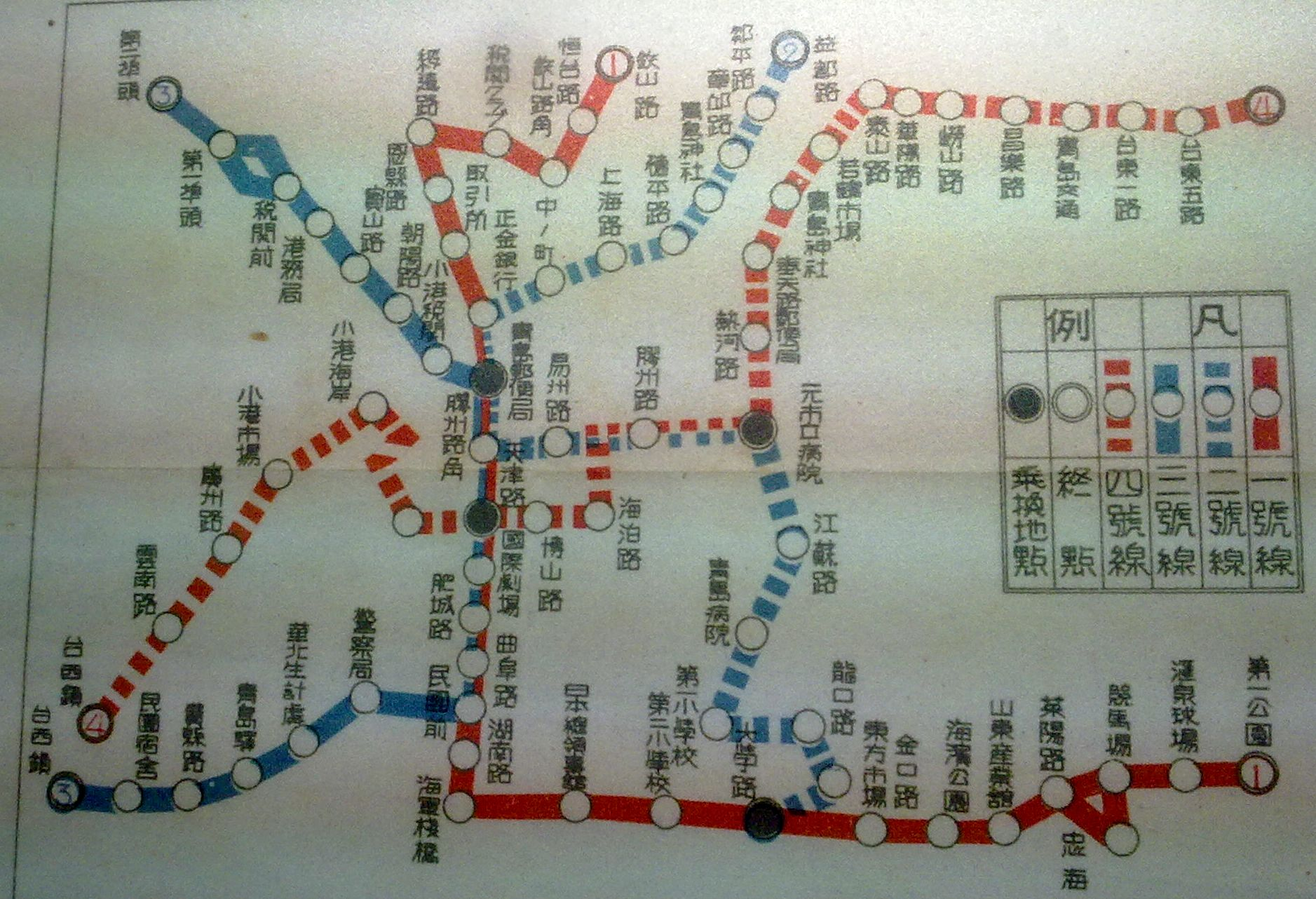 1940年公交路线图